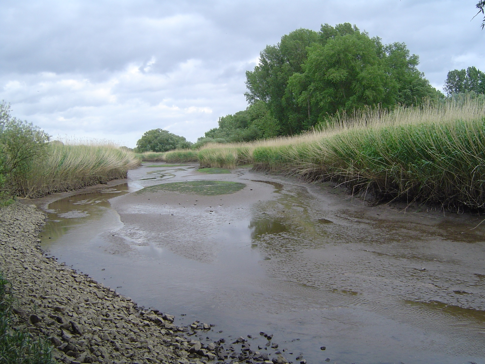 Tide-Süßwasserwatt Heuckenlock/Süderelbe